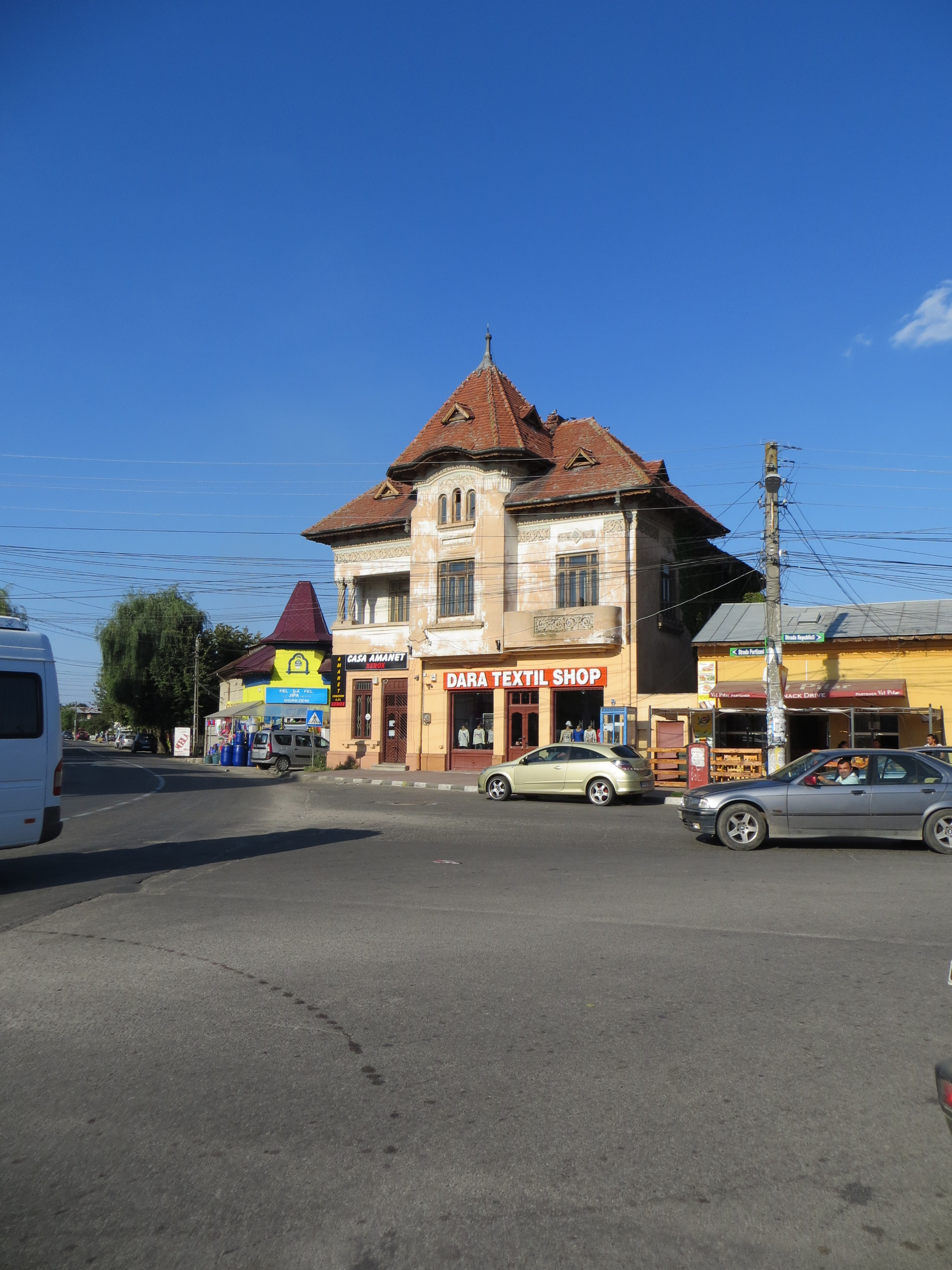 Casa Manolache, Bolintin Vale